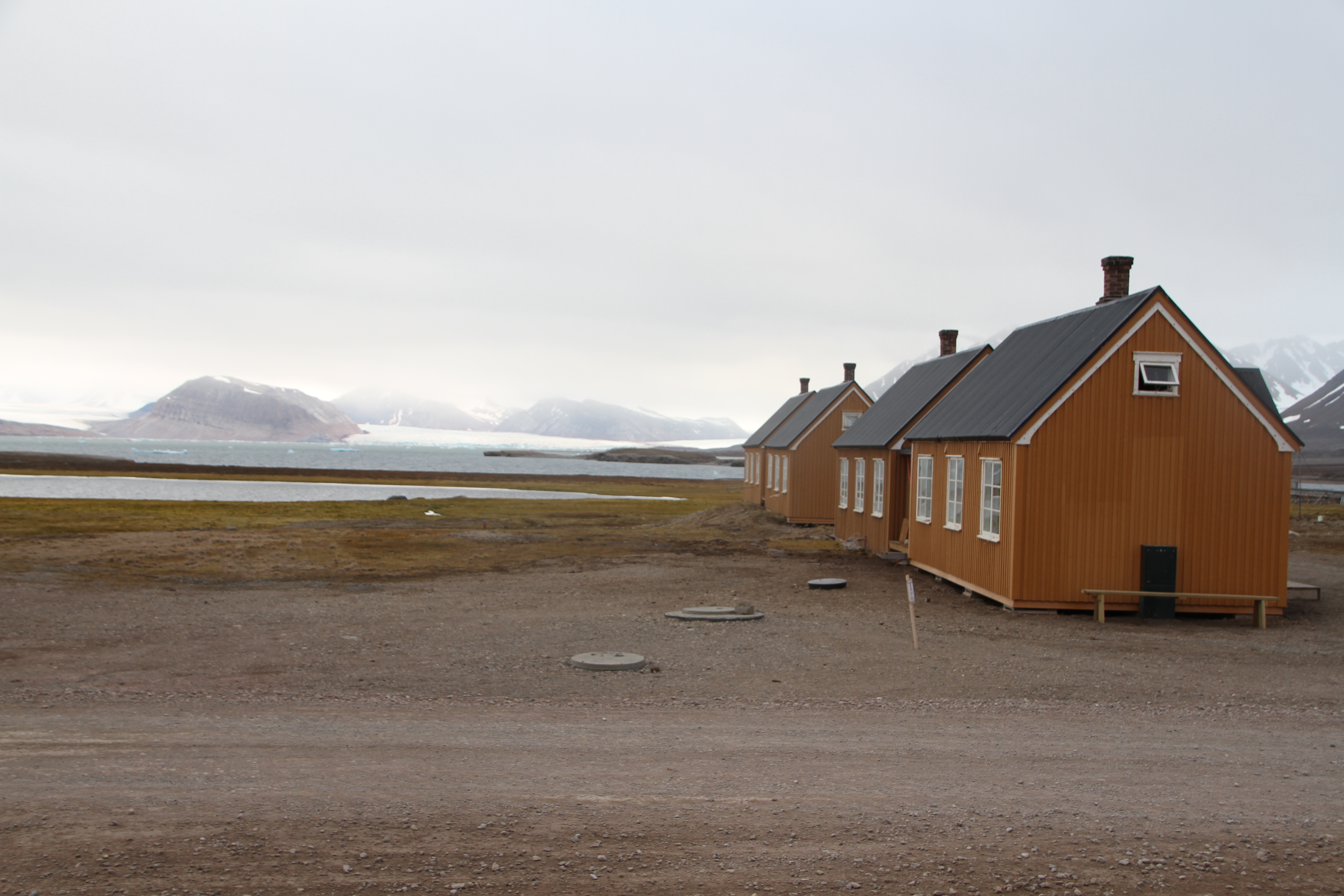 Ny-London houses, from the Blomstrandhalvöya mining community that was abandoned in the interwar period. The houses have been moved to their present location in Ny-Aalesund, where they serve as dwellings and dutch research center. Spitsbergen.